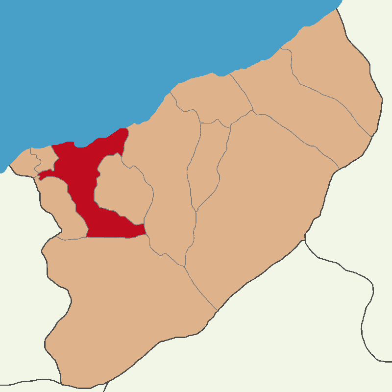 Rize Merkez ilçe merkezi